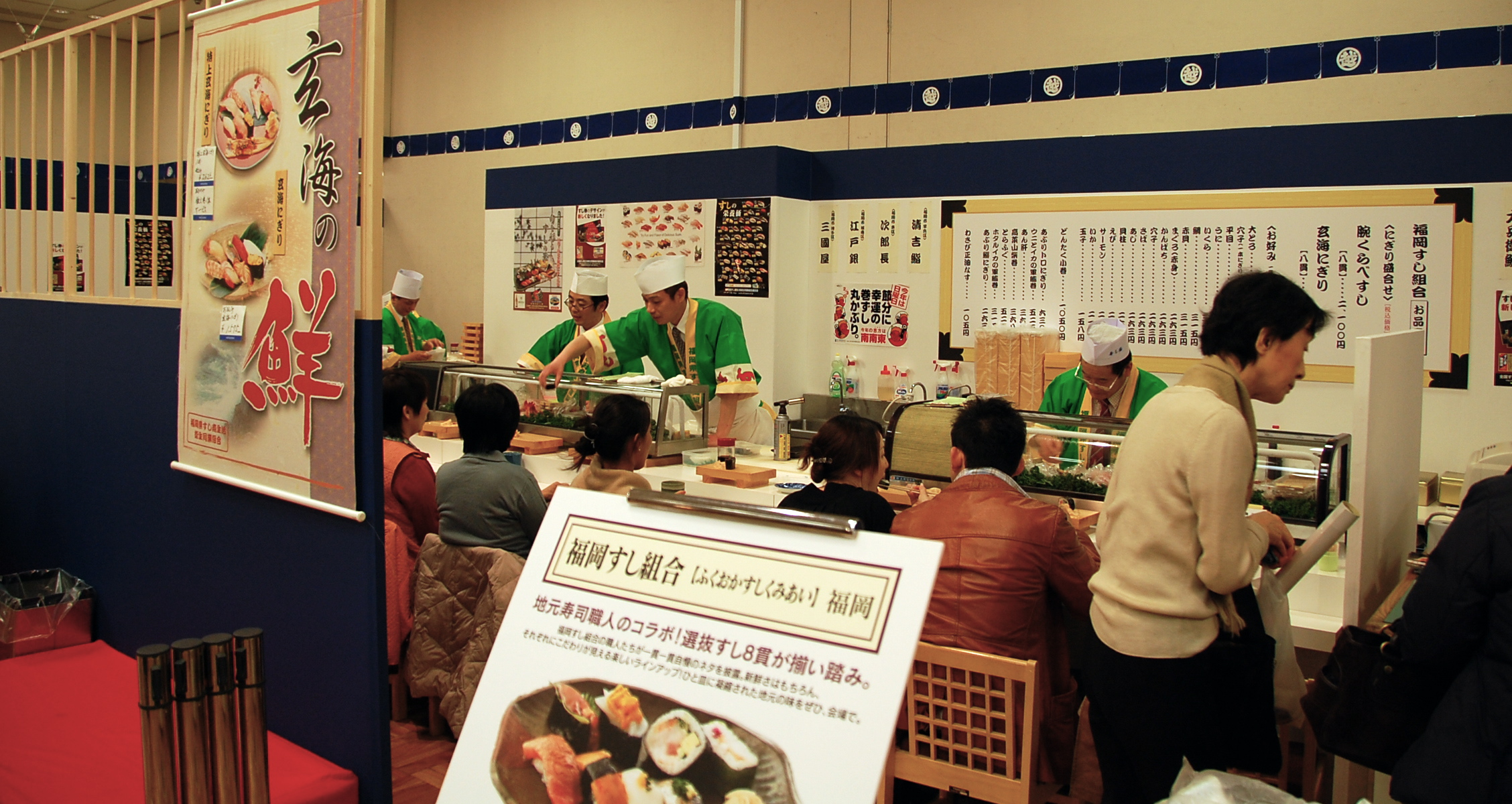 In a department store